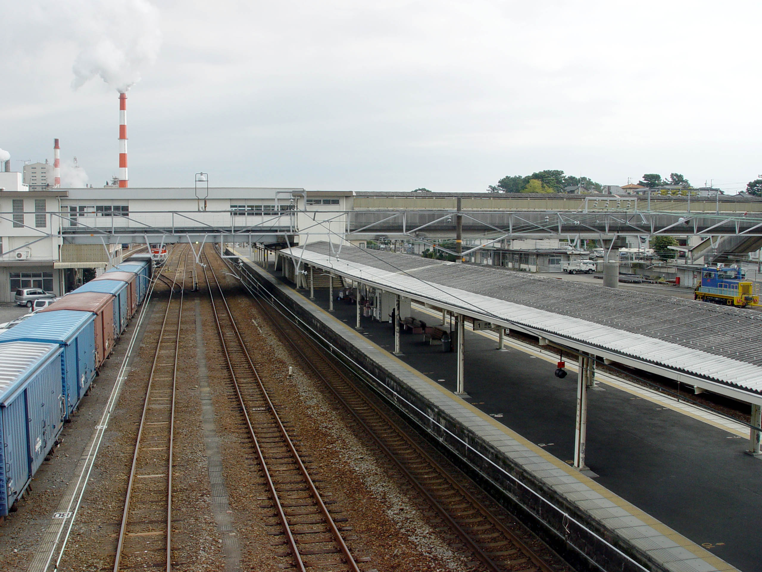 Yoshiwara Station, Tokaido Line, Japan